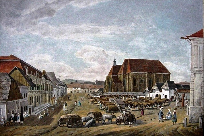 Kolozsvár főtere 1840-ben. Josef Hofreit.